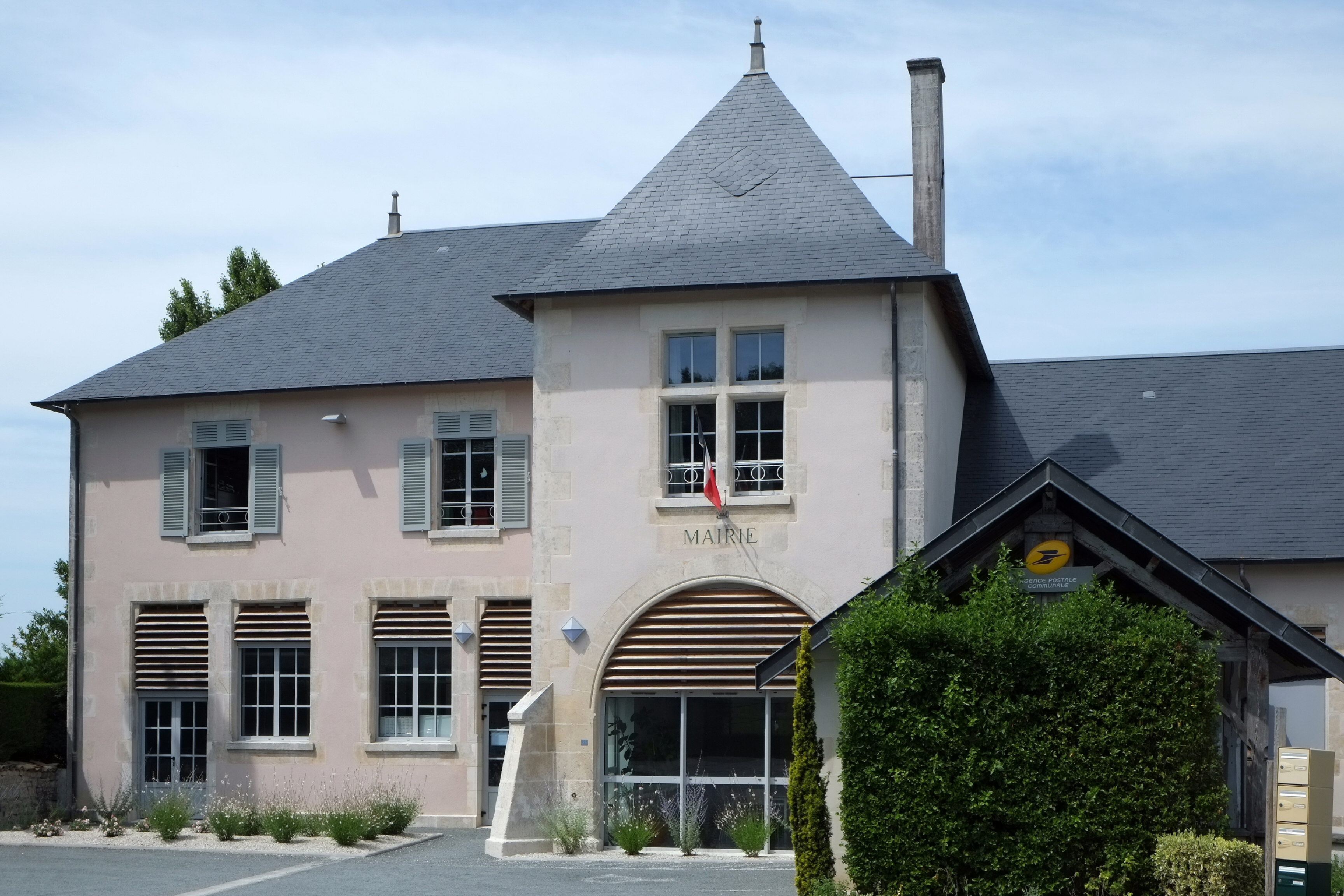 La mairie Saint-Saturnin-du-Bois Charente-Maritime France